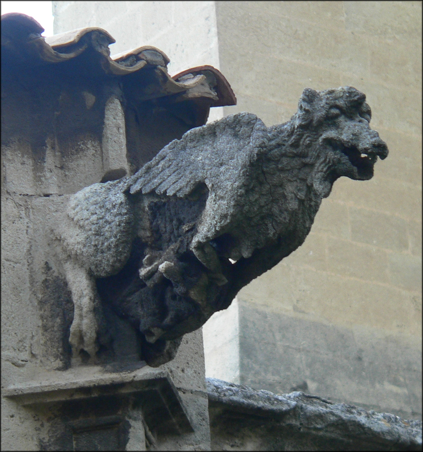 Cathédrale Saint-Just de Narbonne (Aude)